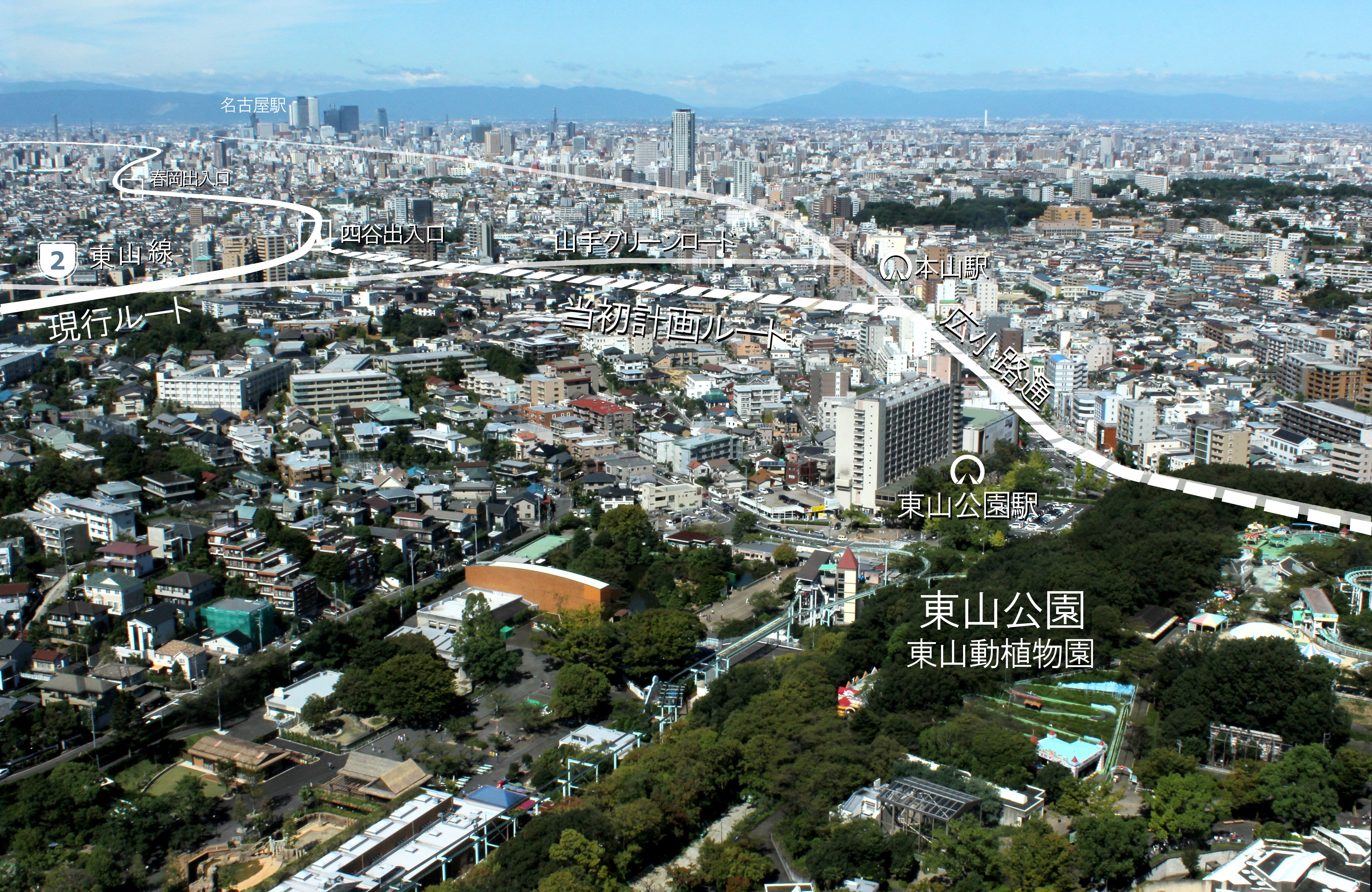 1973年都市計画時点の名高速東山線の計画路線（破線部）